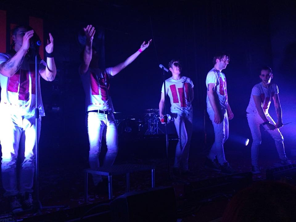 Skupina Mandrage na turné Siluety II v Kladně.